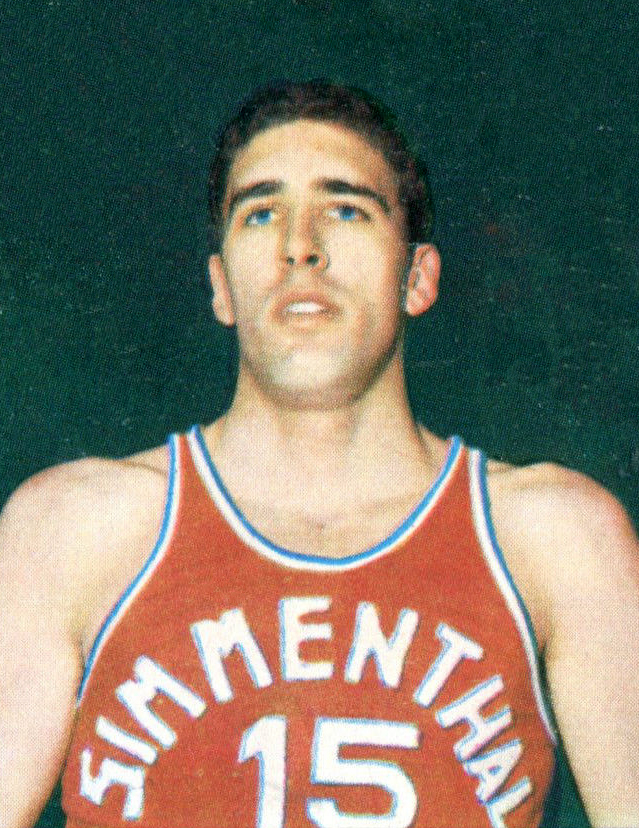 CAMPIONI DELLO SPORT 1968/69 - n. 273 - C. RAYMOND -USA-Rec